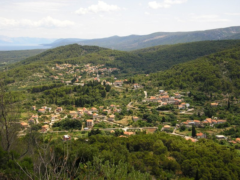 Dol na otoku Hvaru